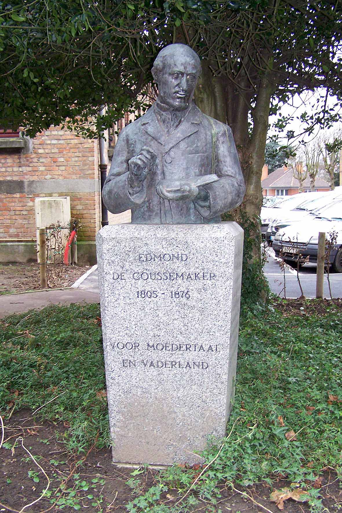 BAILLEUL (France - dép. du Nord) — Buste d'Edmond de Coussemarker